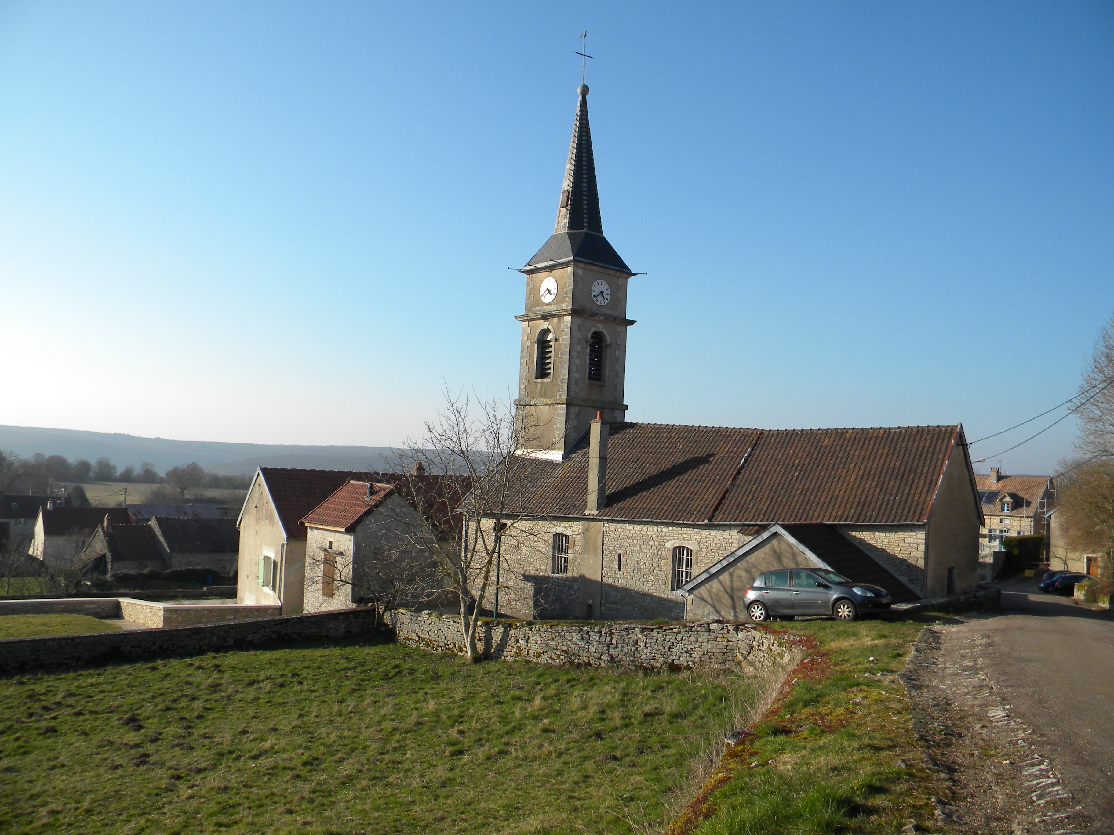 Preĝejo de Saint-Jean-de-Bœuf